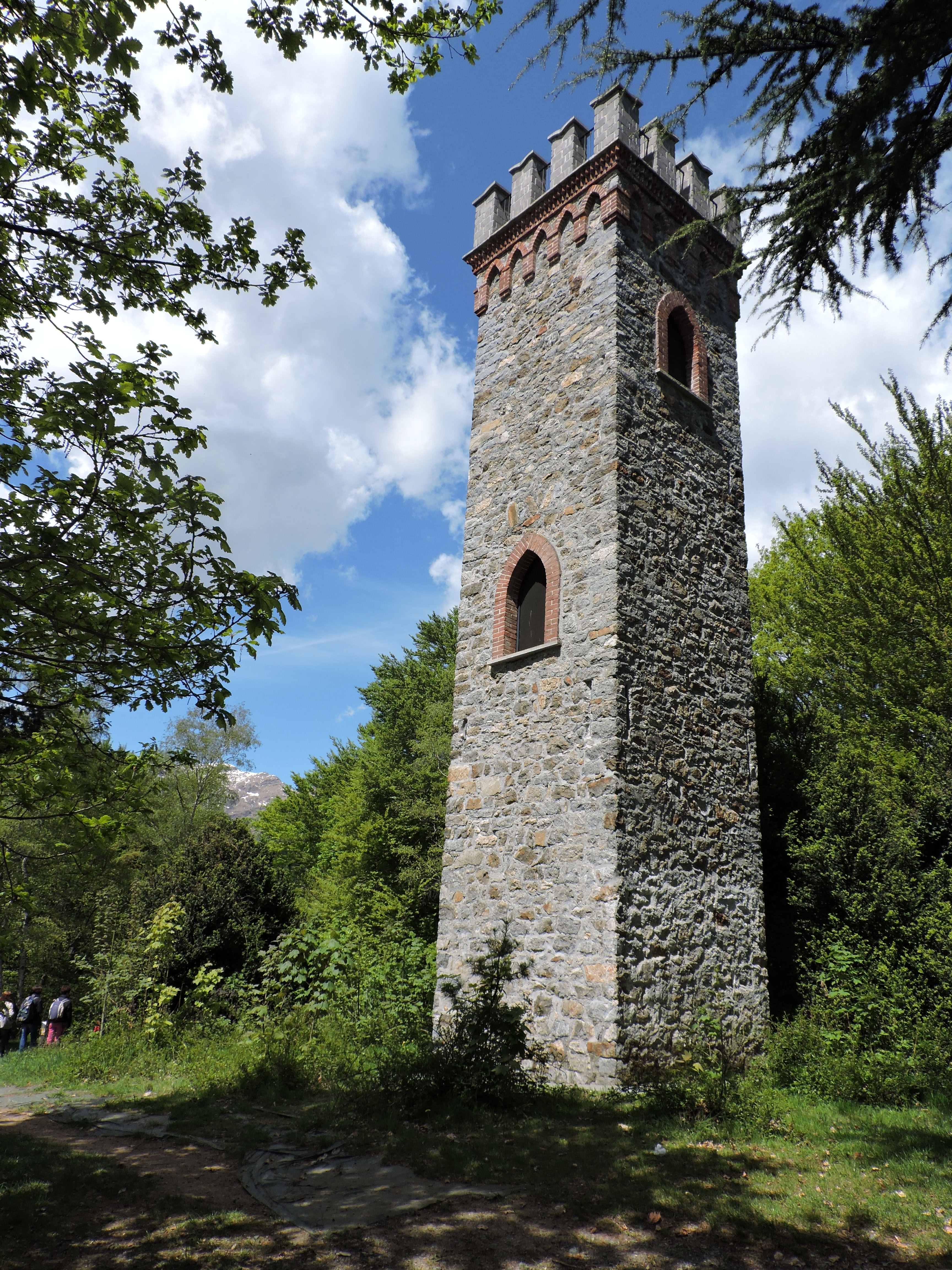 Riserva naturale del Parco Burcina-Felice Piacenza (Q3936914) Summit tower